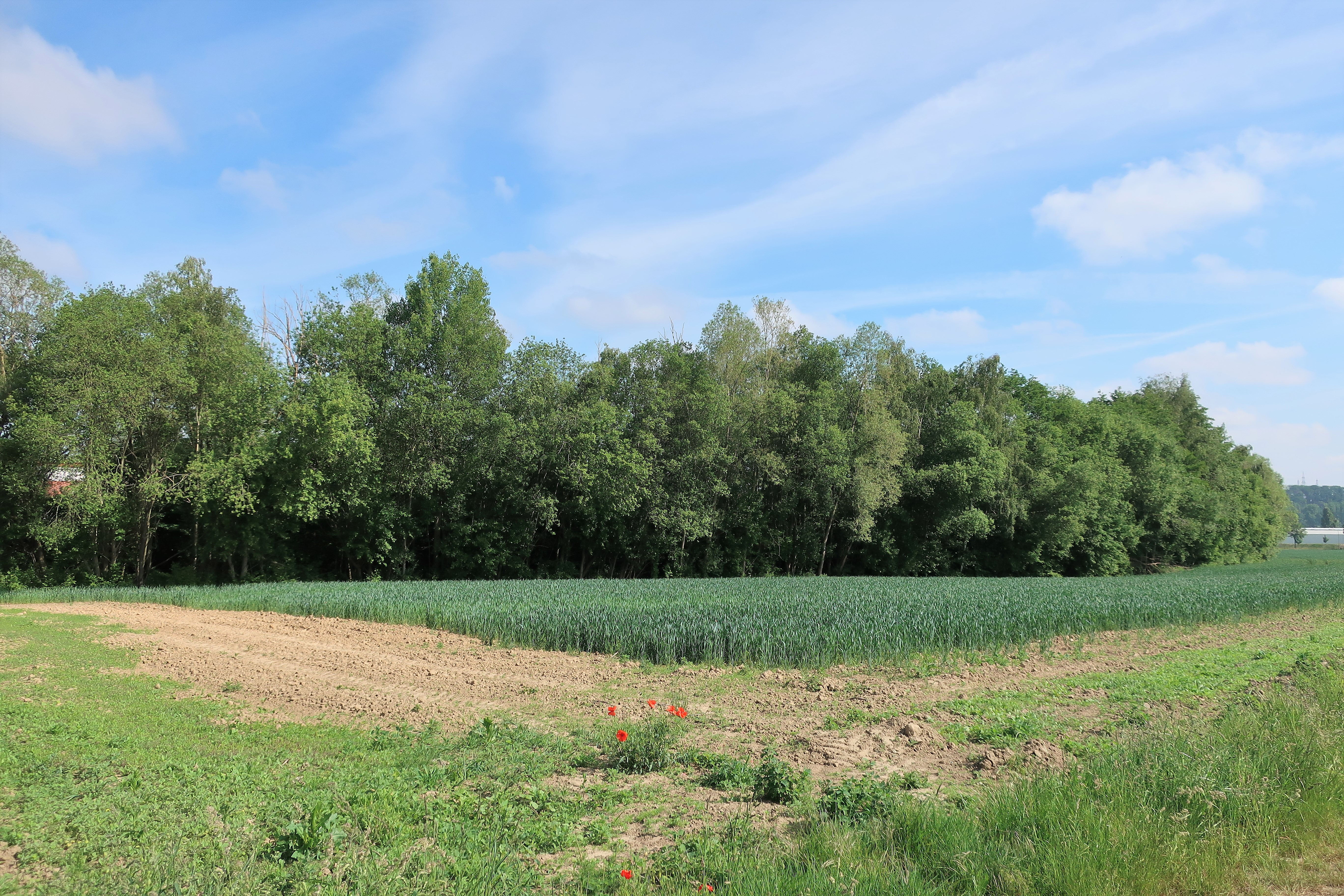 Geschützer Landschaftsbestandteil 1.4.2.14 „Fleyer Bach“ in Hagen, östlich von Fley. Der Bereich erstreckt sich im Anschluß an den Fleyer Wald zwischen Sauerlandstraße und Feldmühlenstraße. Der begradigte Bachlauf wird von einem z.T. sehr alten Weidensaum begleitet, an den sich im Norden ein Weidengebüsch anschließt.